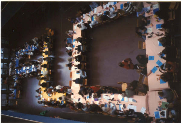 Ved Folkeskoleelevernes Landsorganisations elevkonference i efteråret 2001 i Århus blev bordene under en del af mødet stillet op i en bordplan svarende til organisationens forkortelse - FLO.